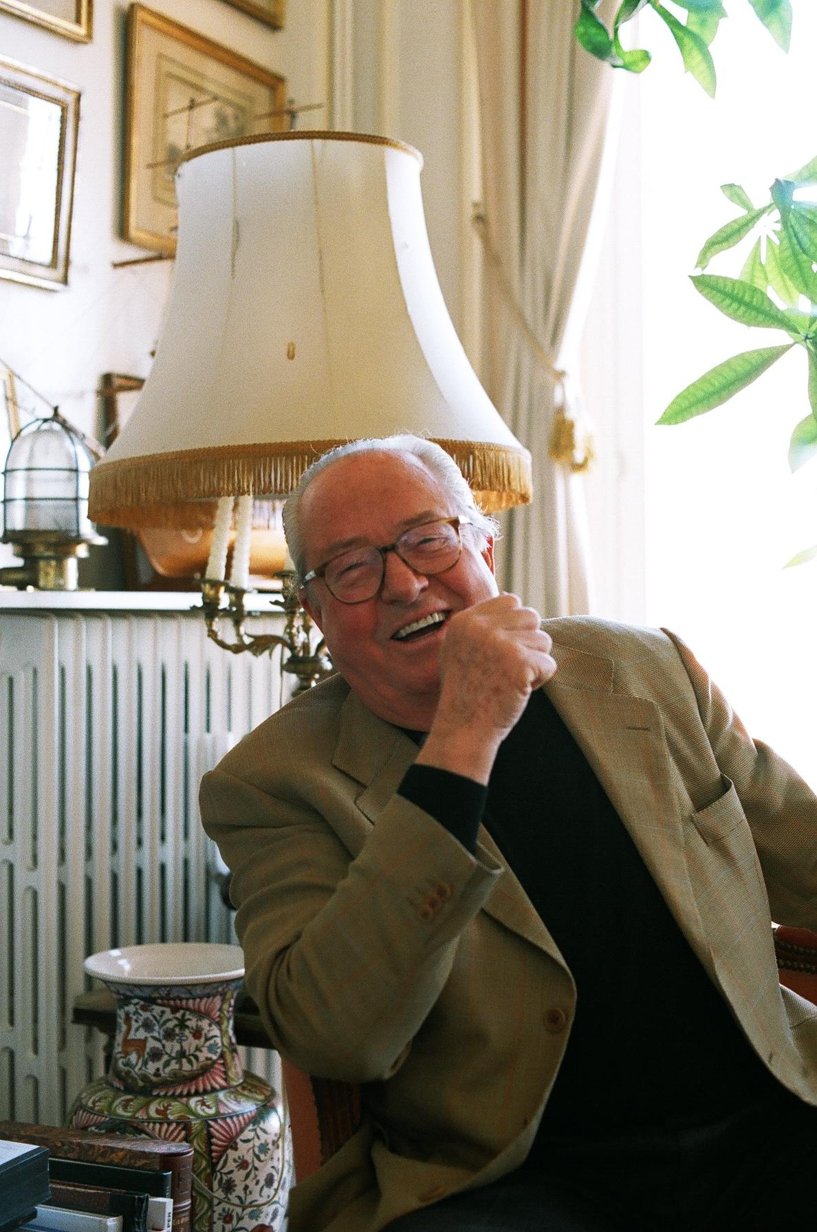 Jean-Marie Le Pen à sa maison